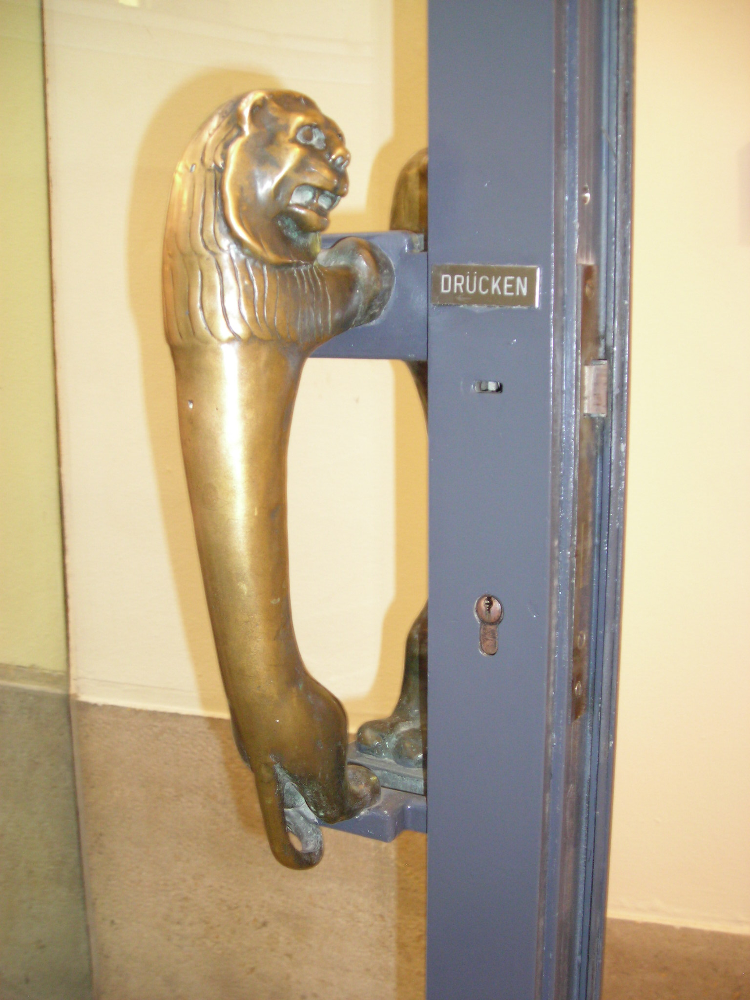 Ziehgriff. Türgriff in Form eines Löwenkopfes im Odeon, München